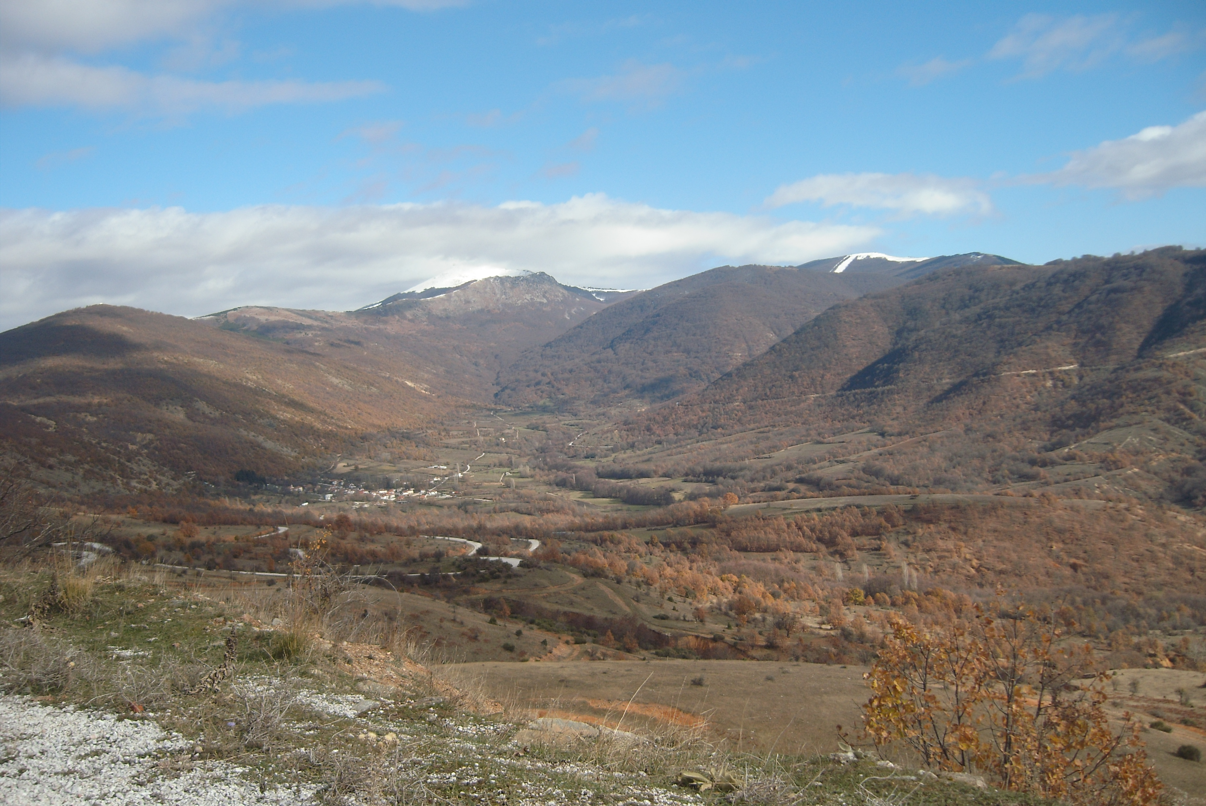 Вишени и Вич